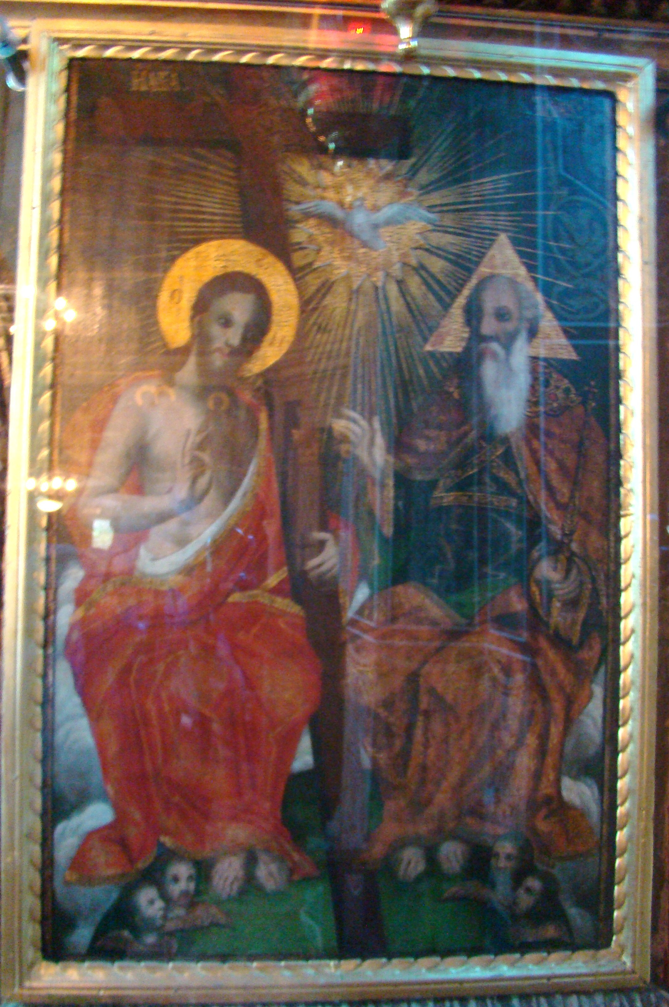 Biserica Ortodoxă Sf. Treime din Cluj